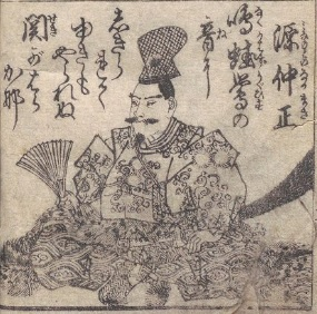 源仲政